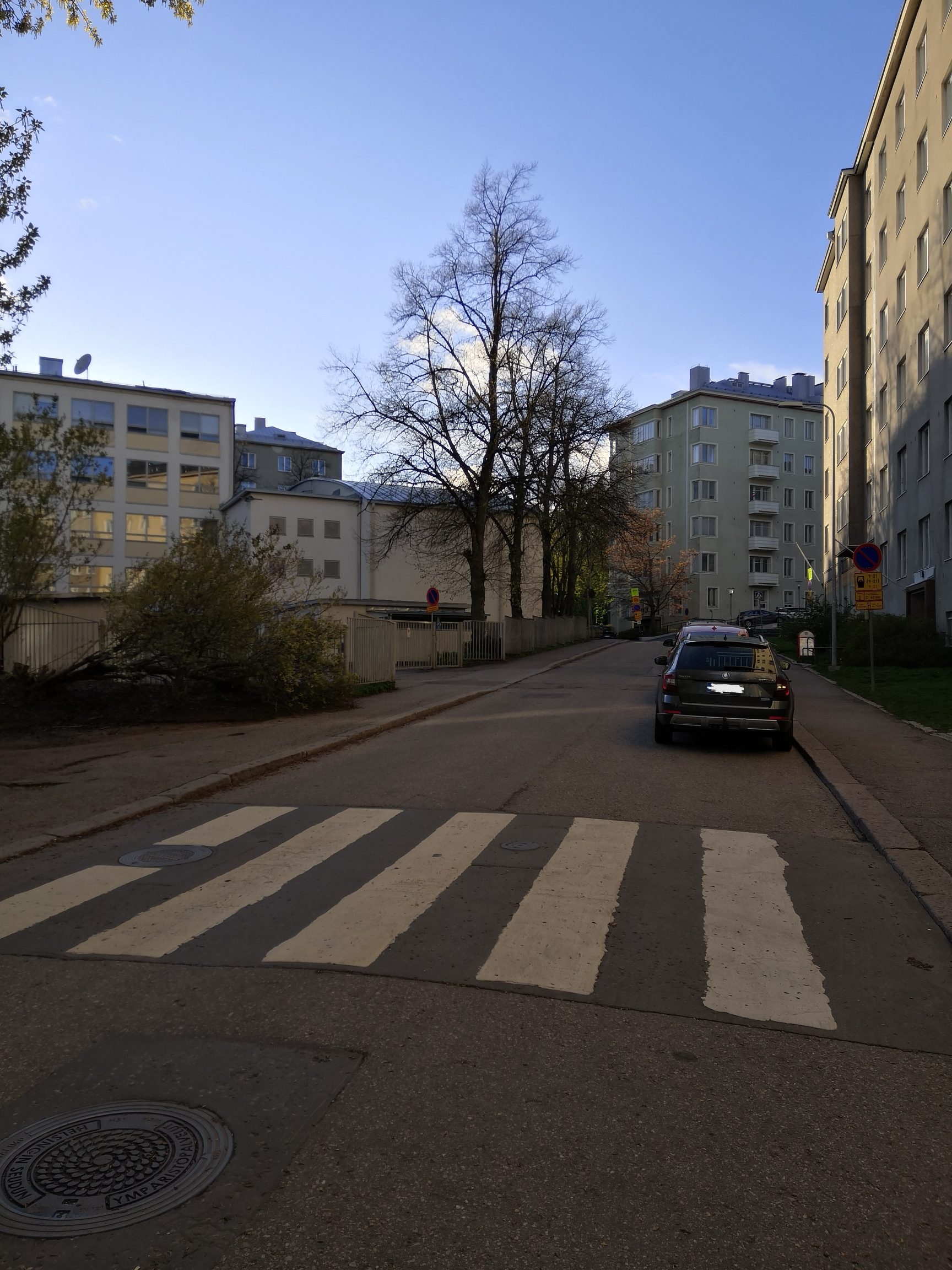 Minna Canthin katu Helsingin Taka-Töölössä. Kadun eteläpää. Vasemmalla Venäjän tiede- ja kulttuurikeskus.